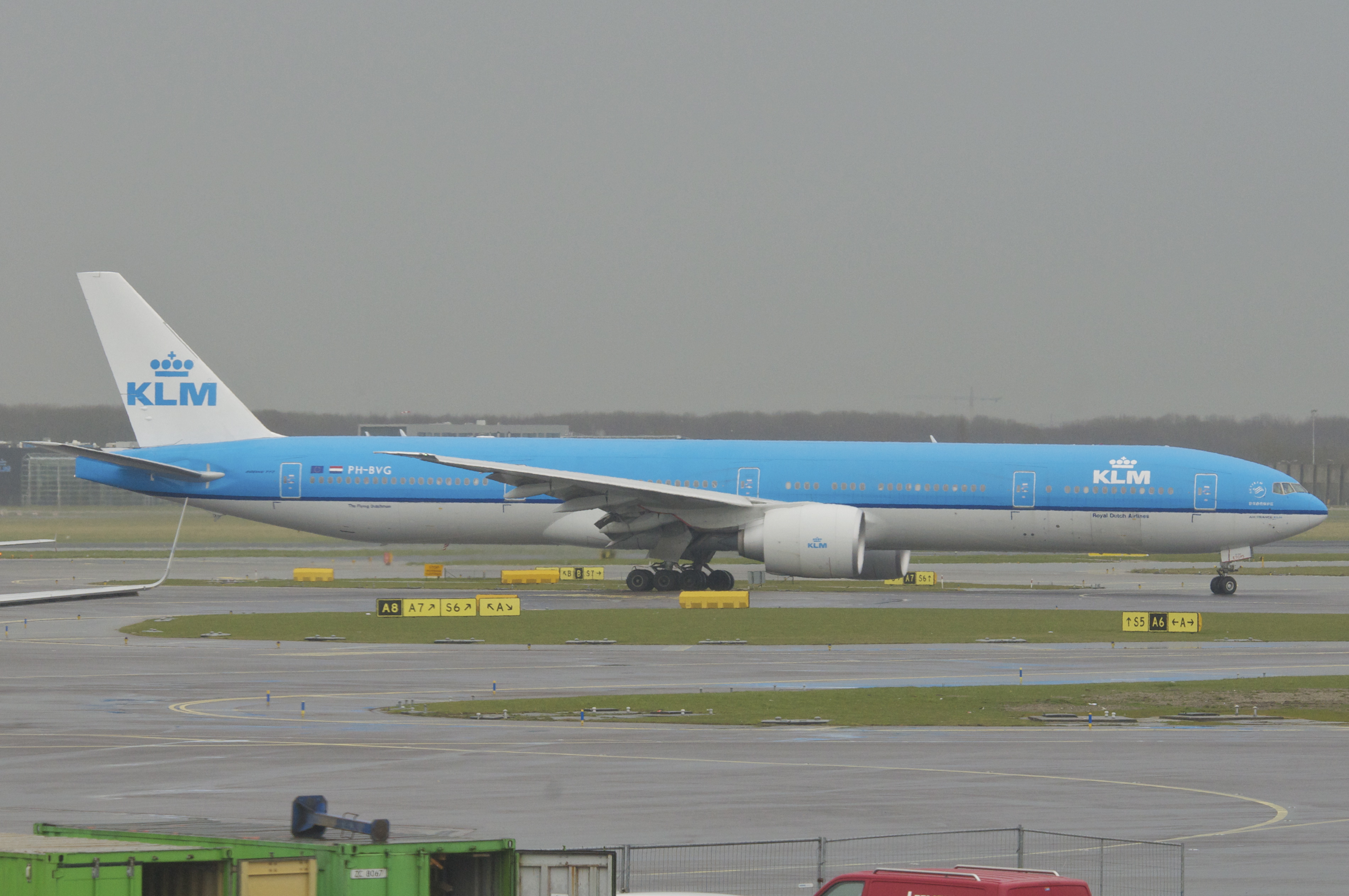 KLM Boeing 777-300ER; PH-BVG@AMS;15.04.2013/705dh